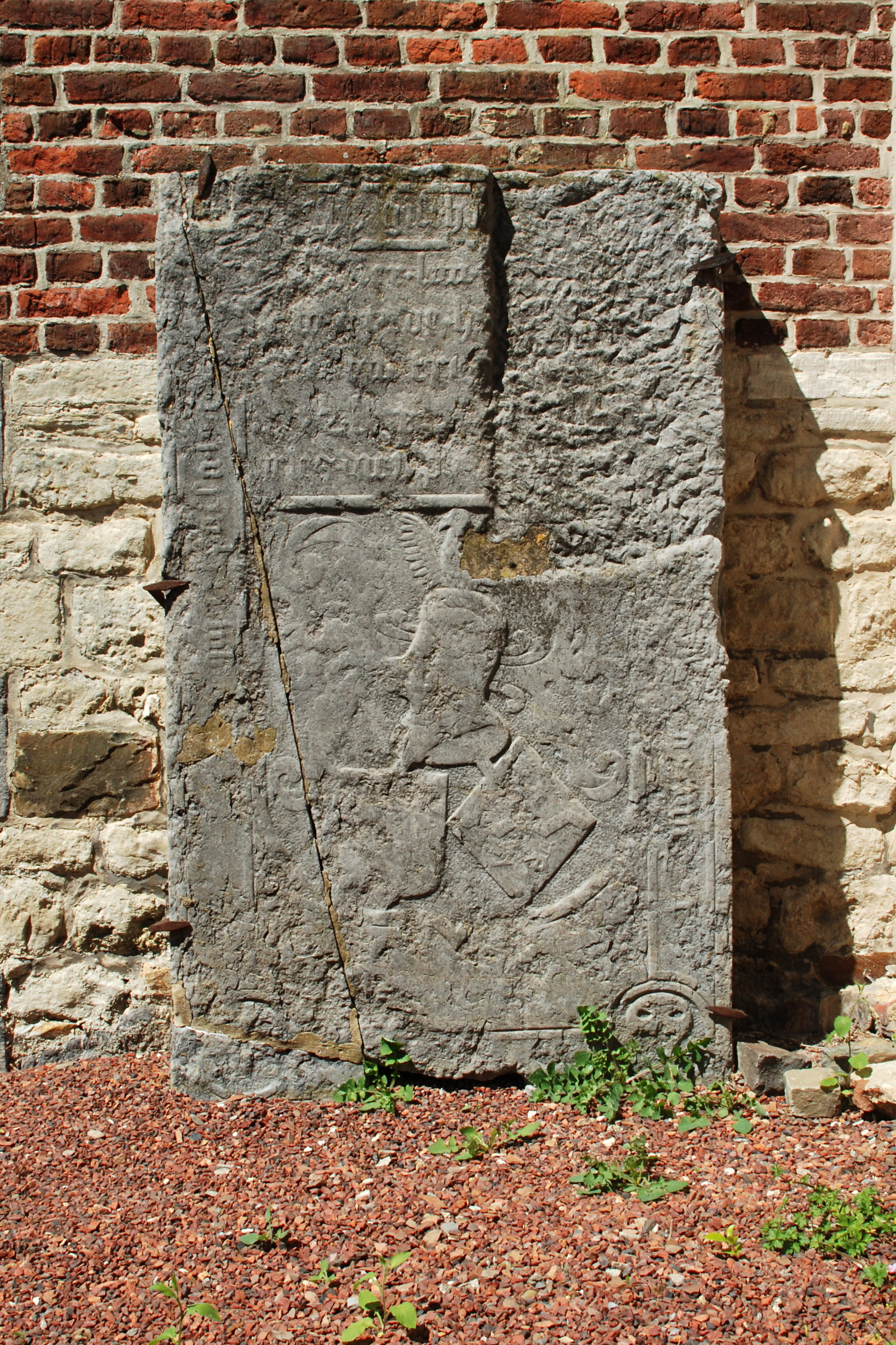 Belgique - Brabant wallon - Mont-Saint-Guibert - Église Saint-Pierre de Corbais - Dalle funéraire d'un seigneur inconnu